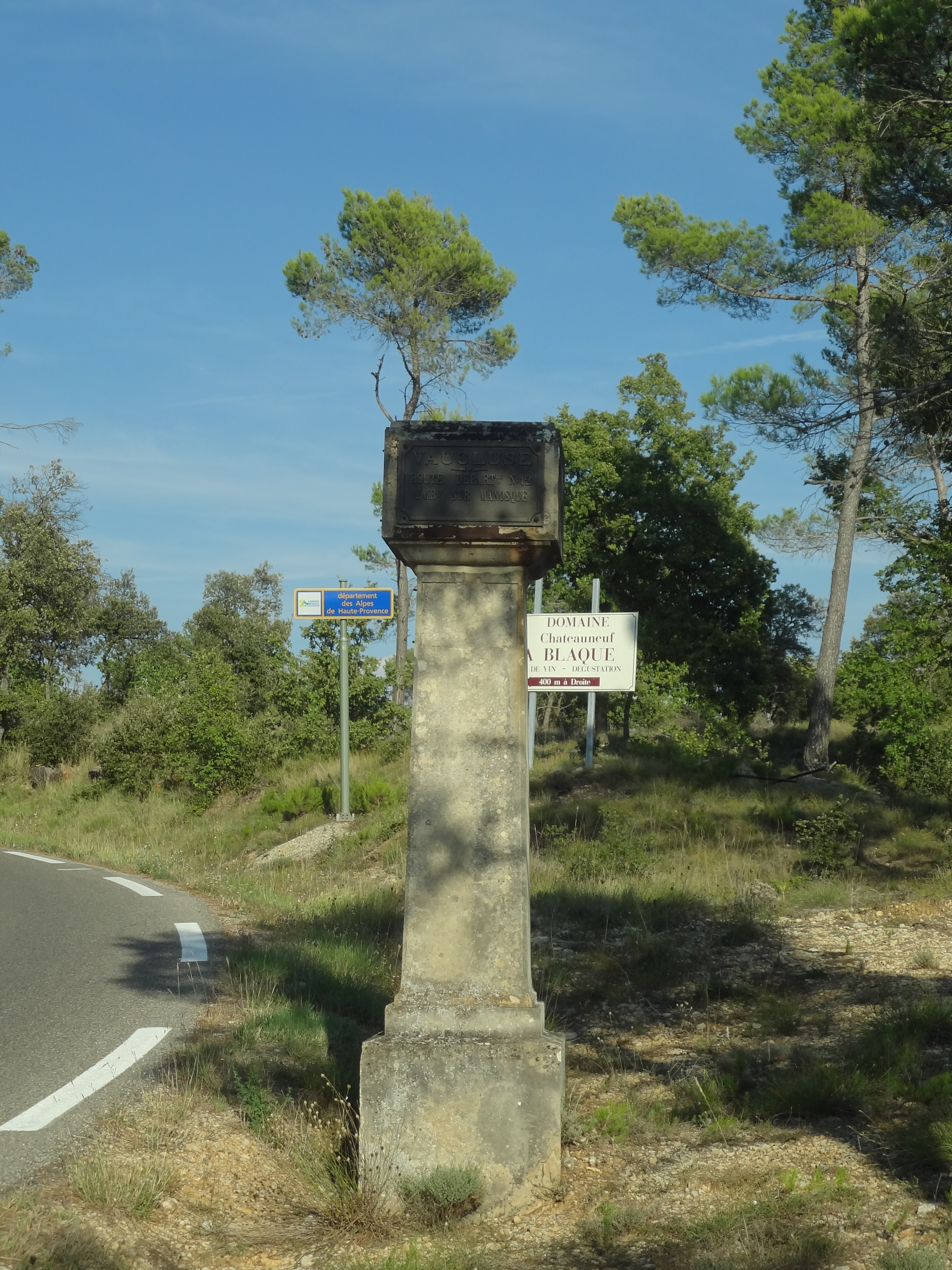 Borne similaire au poteau de Telle, sur la départementale 12 du Vaucluse, à la limite du département des Alpes-de-Haute-Provence (Basses-Alpes). Actuellement RD 6